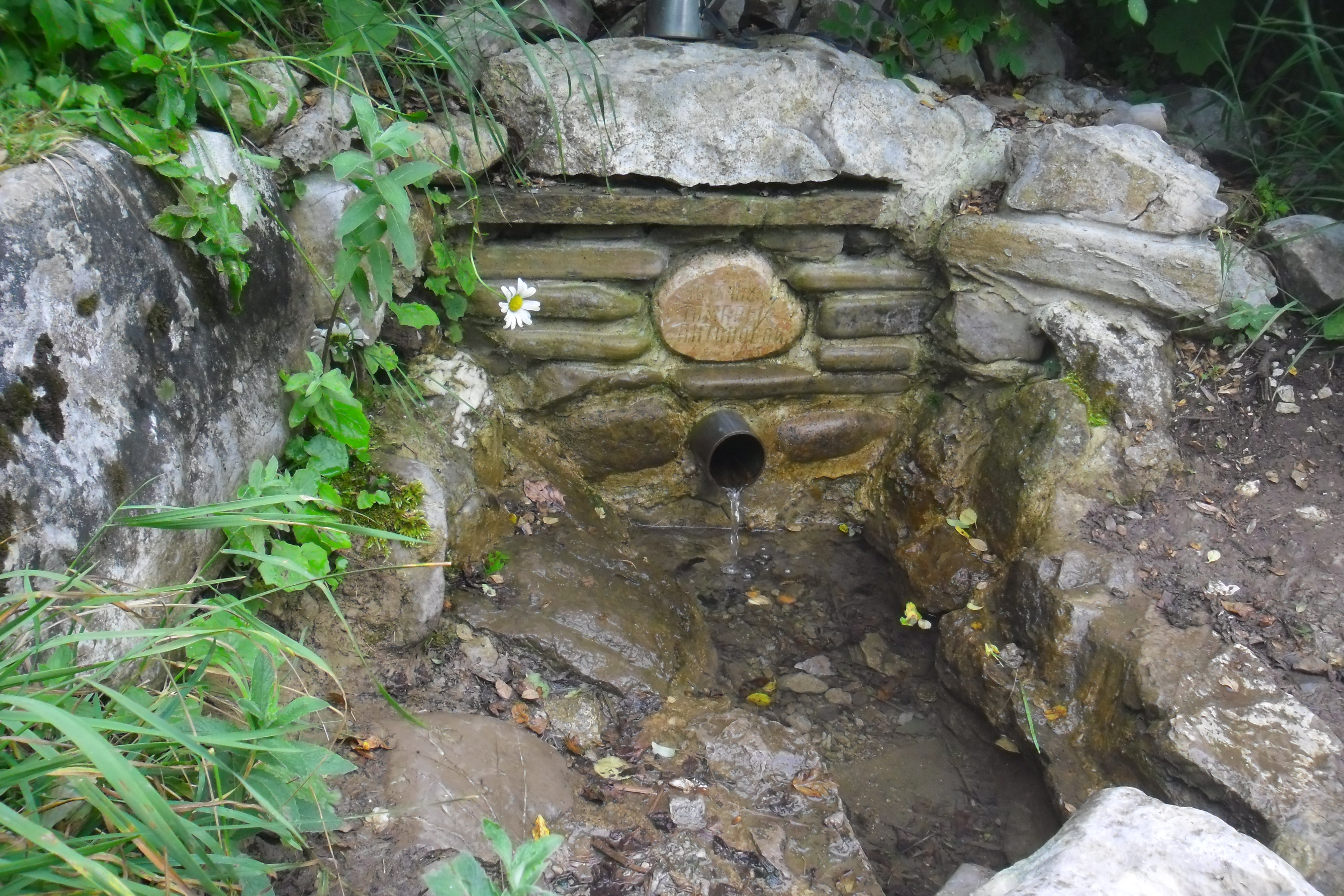 Фото